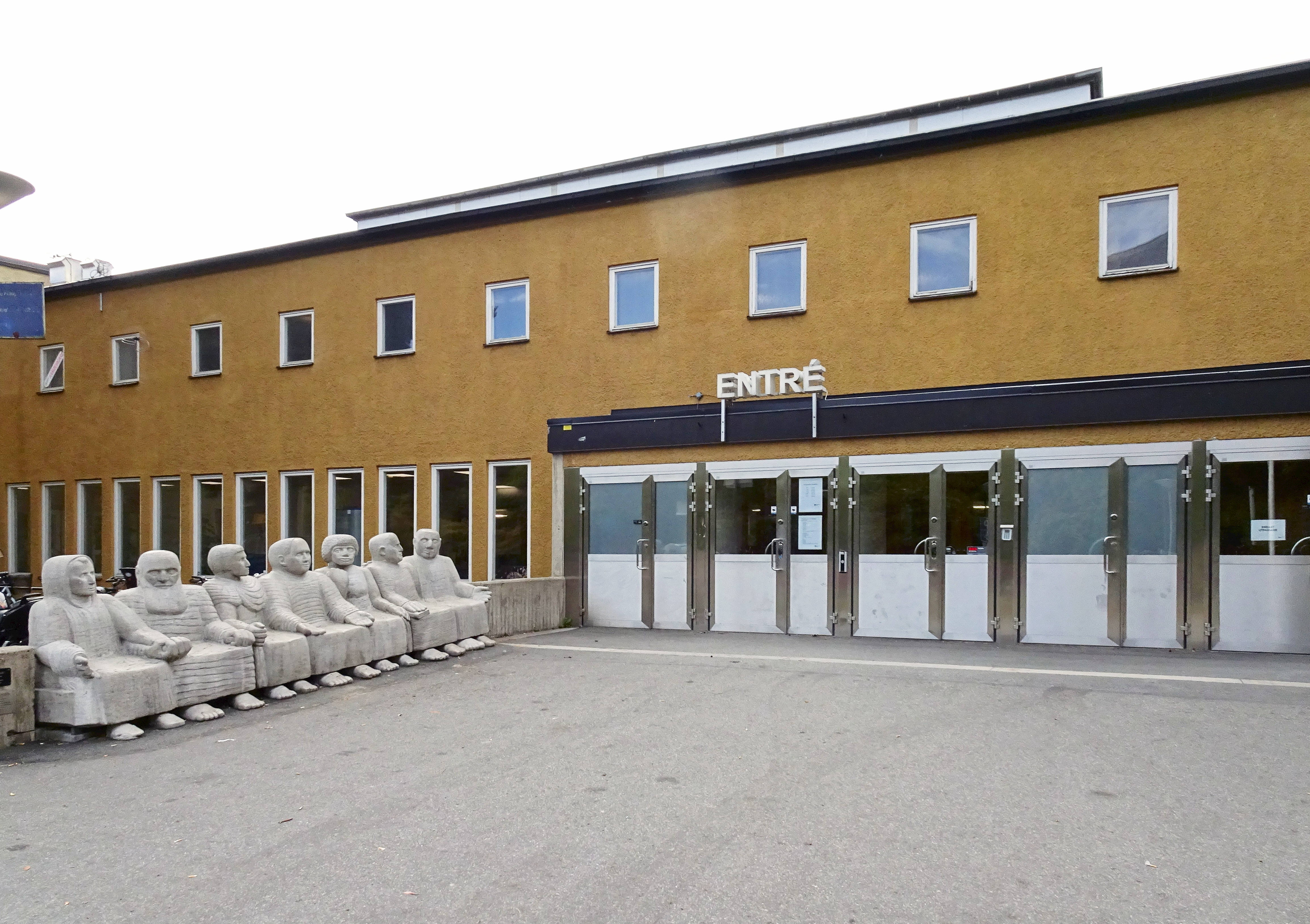 Västertorps sim- och idrottshall, entré